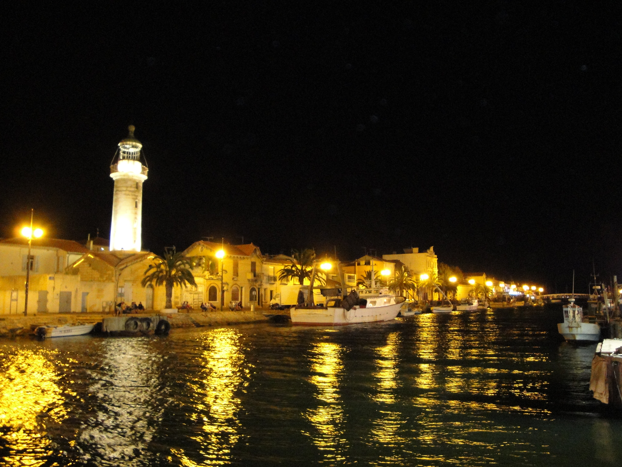 le canal, de nuit.